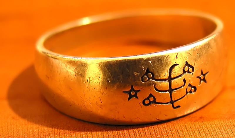 Baha'i Ringstone Symbol